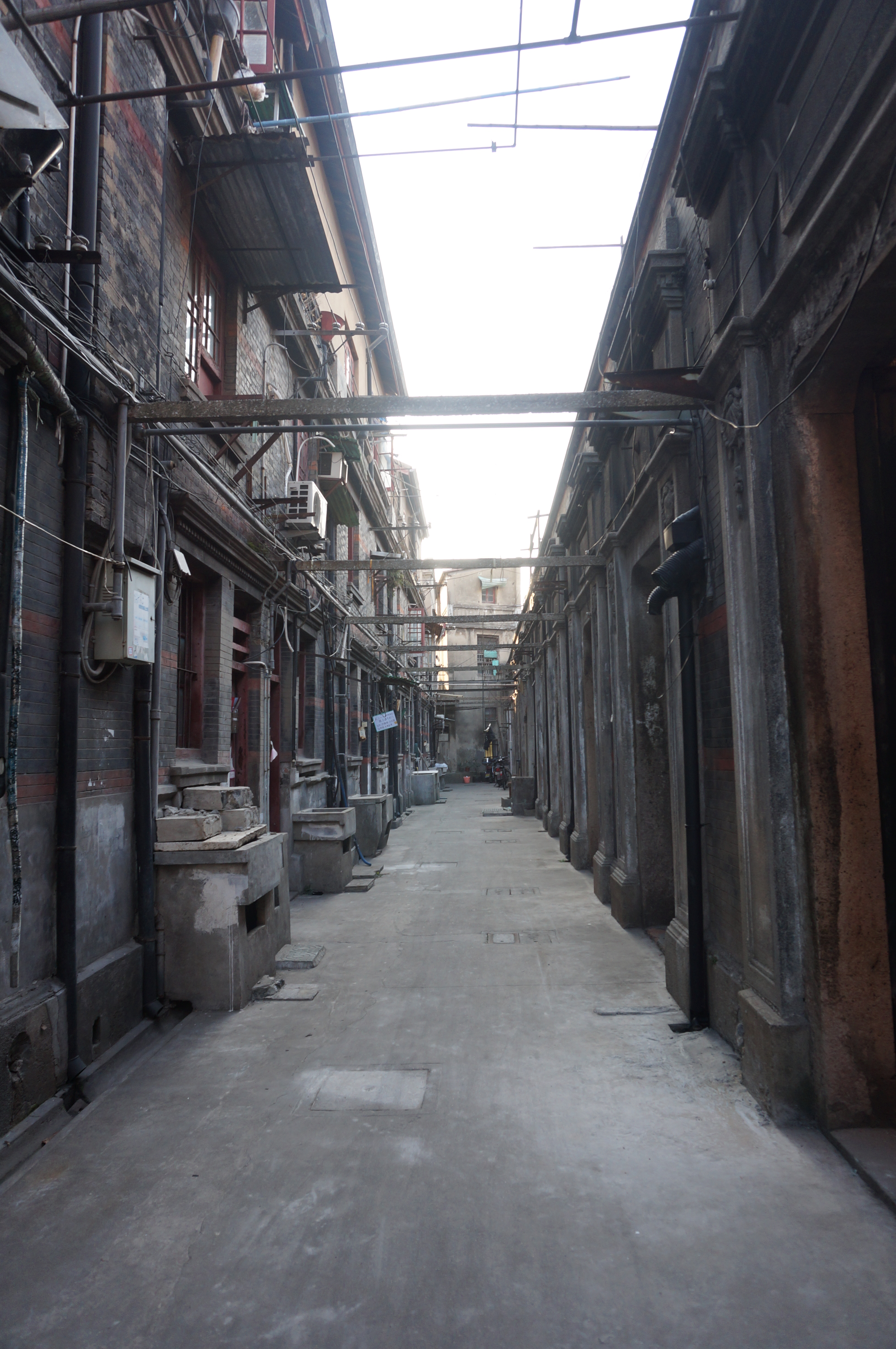 中文（中国大陆）: 东斯文里被拆除前夕的弄堂